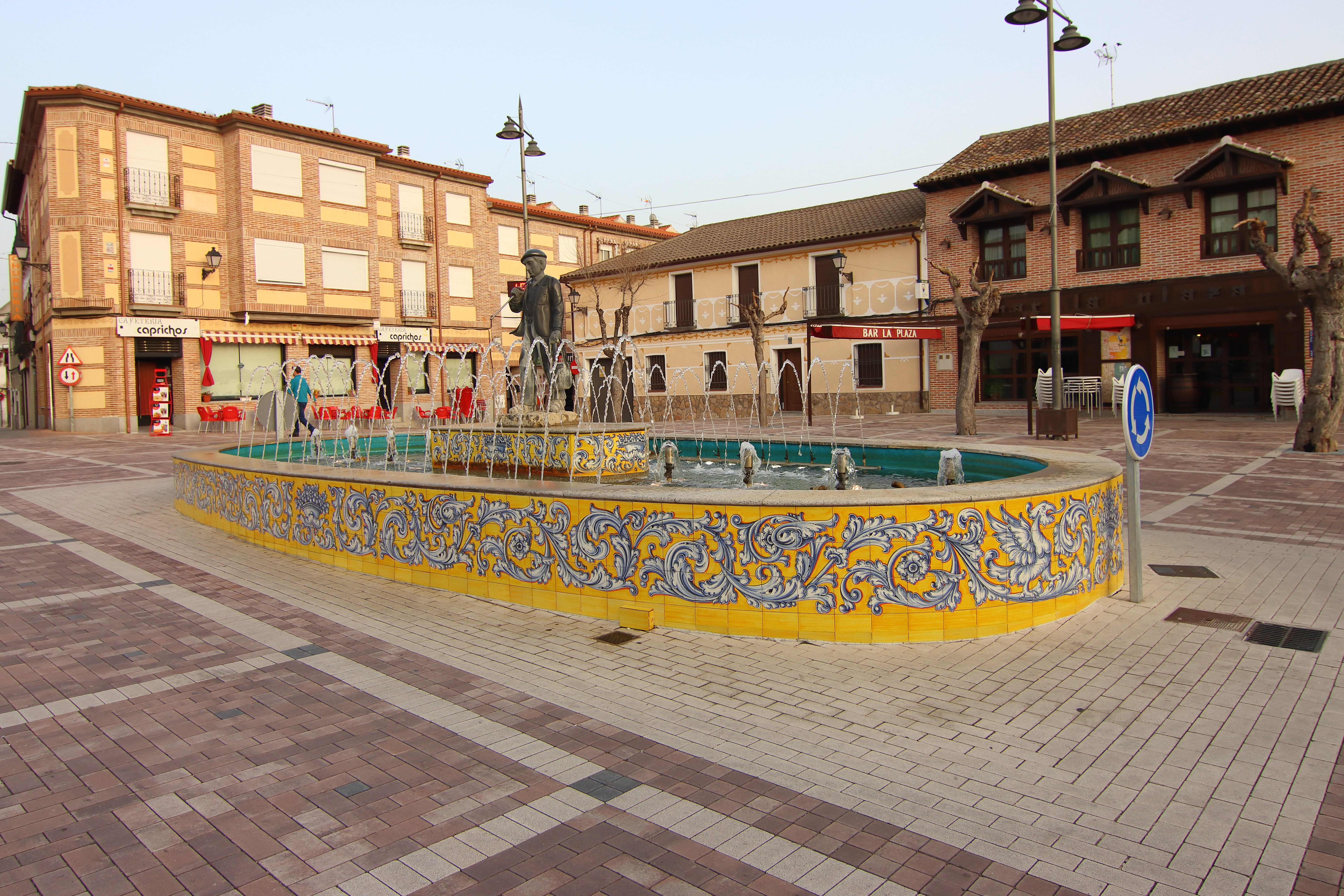 Abreadero con cerámica de Talavera, en Plaza de España. Cazalegas